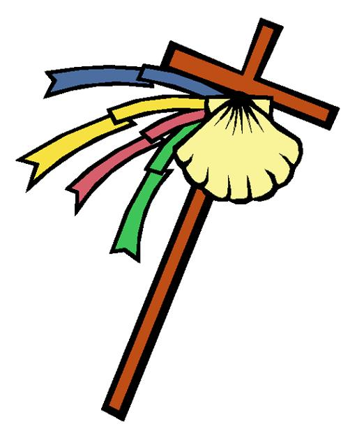 Logotipo de Cursillos: Bastón de peregrino con vieira, y cuatro cintas de colores.